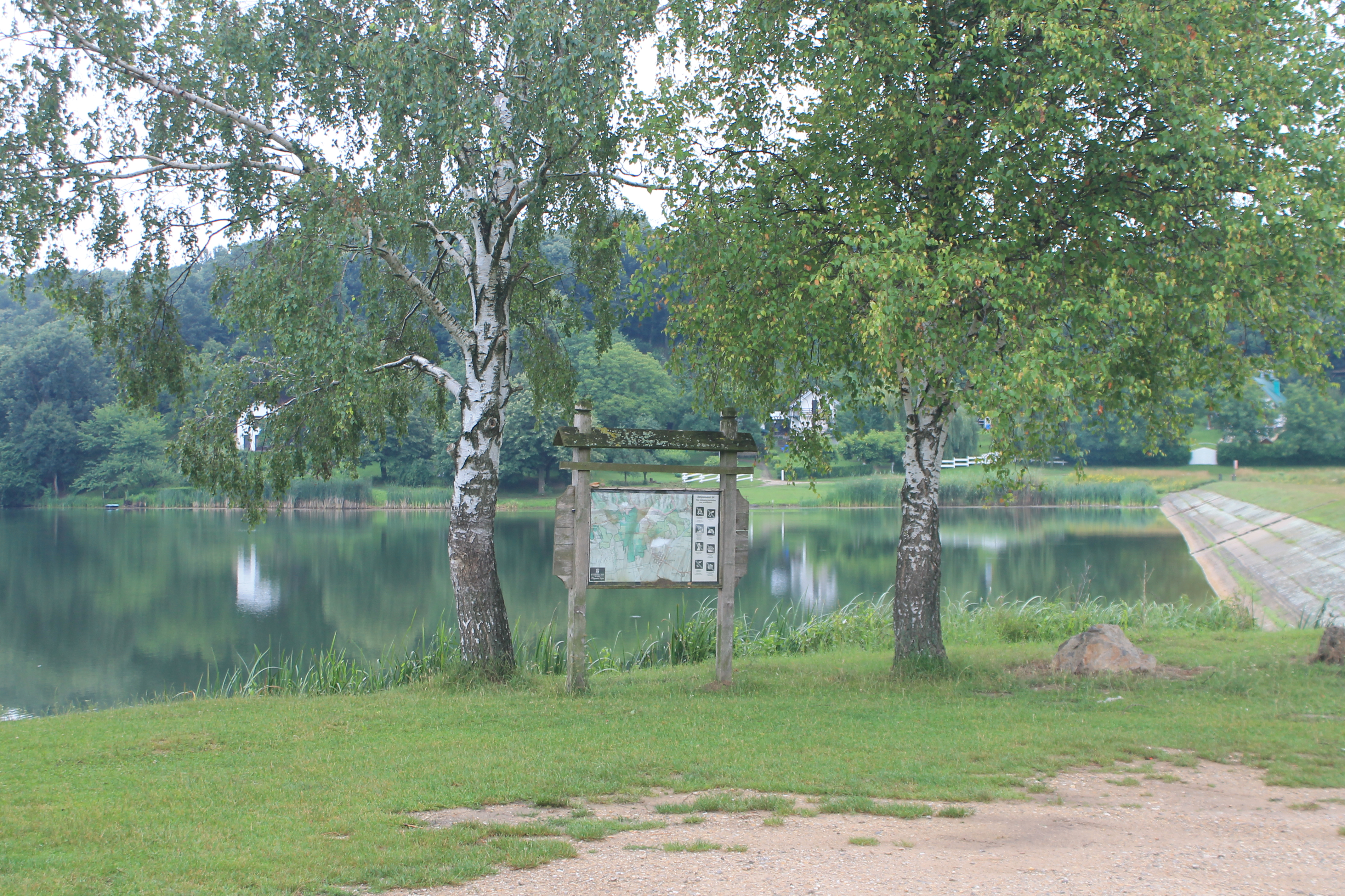 Sotsko jezero